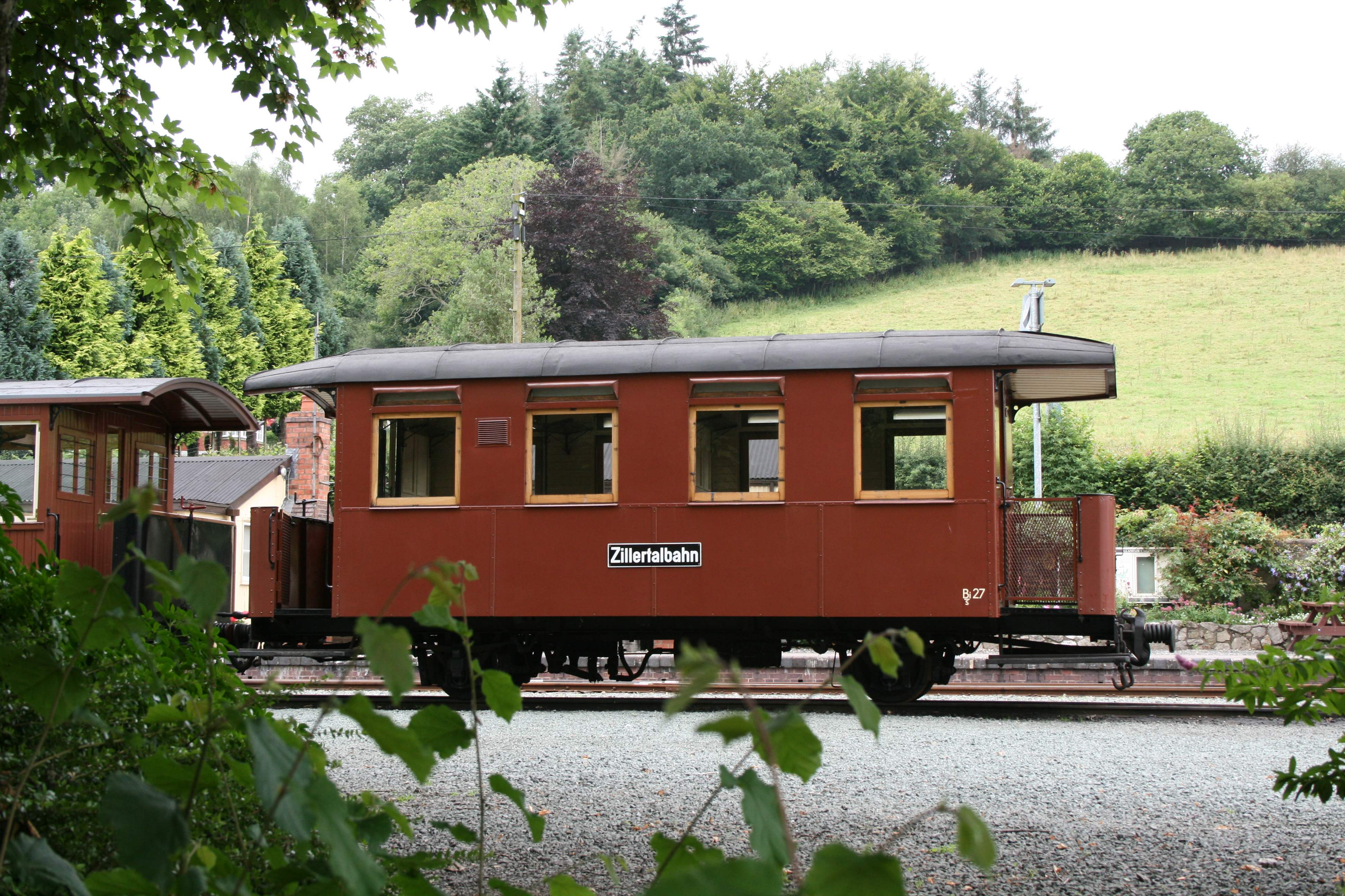 Zillertalbahn carriage